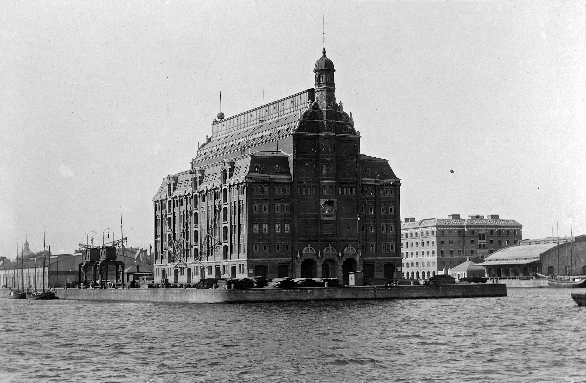 Silopakhuset i Københavns Frihavn, årstal ukendt